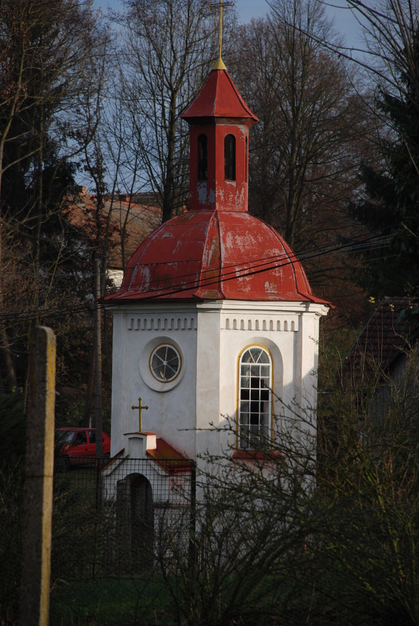 kaple umístěná přímo na návsi vesničky Miletín